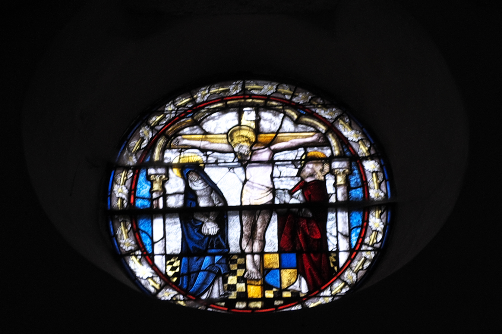 Stiftskirche Saint-Étienne in Eymoutiers im Département Haute-Vienne (Nouvelle-Aquitaine/Frankreich), Bleiglasfenster (Nr. 101), um 1490 bis 1500; Darstellung: Kreuzigungsgruppe